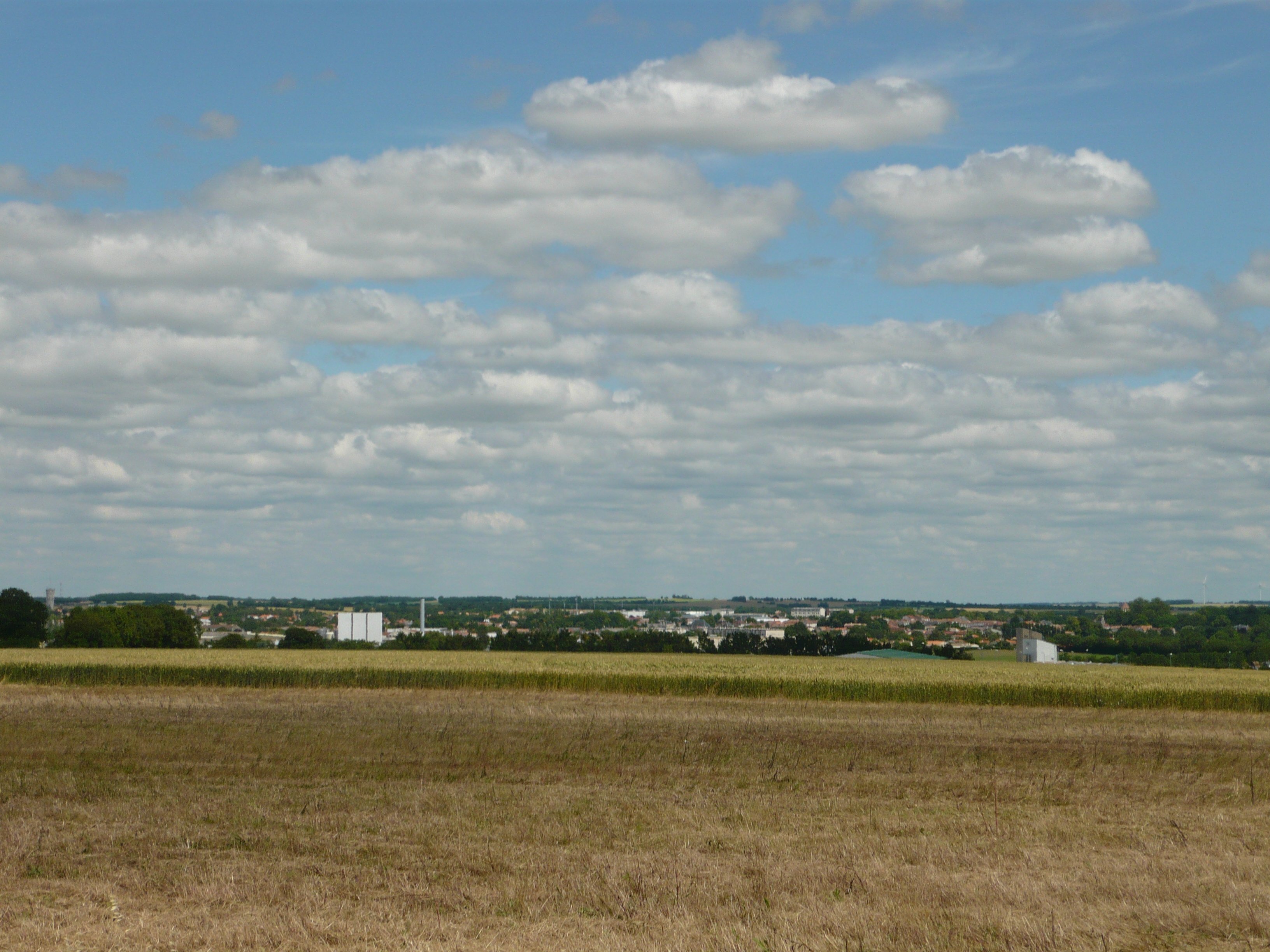 Plaine céréalière de l'Aunis aux portes de Surgères vue depuis l'entrée ouest de la ville (en provenance de La Rochelle).